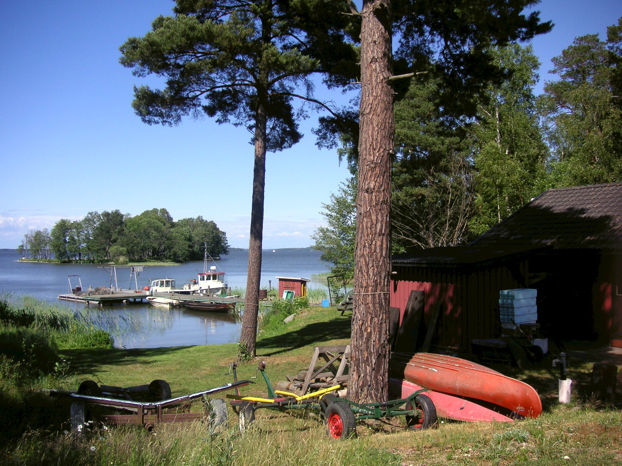 Norra udden av Adelsön vid Horn